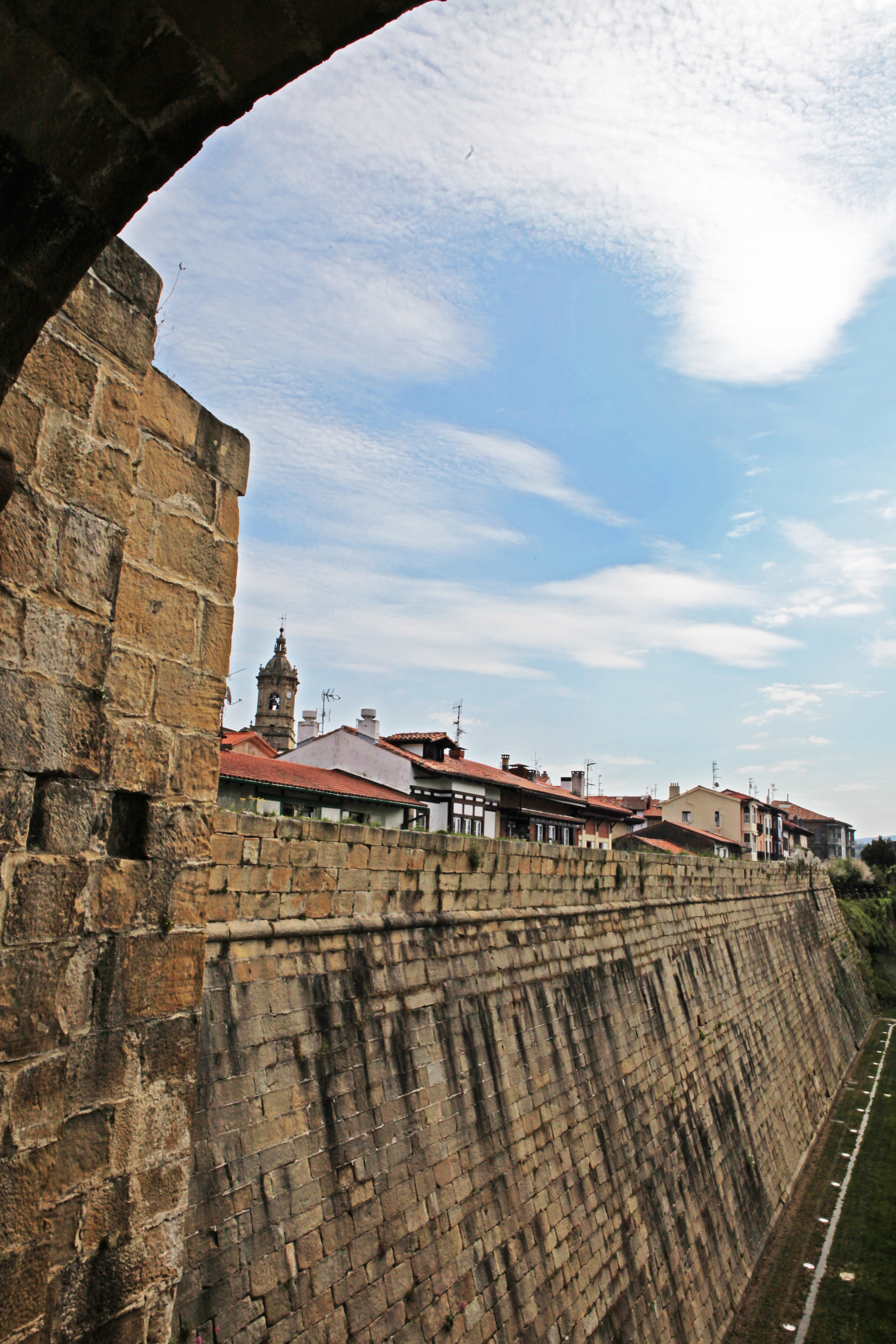 Cortina que une los baluartes de San Felipe y de la Reina, en Hondarribia. Fotografía atomada desde éste último.